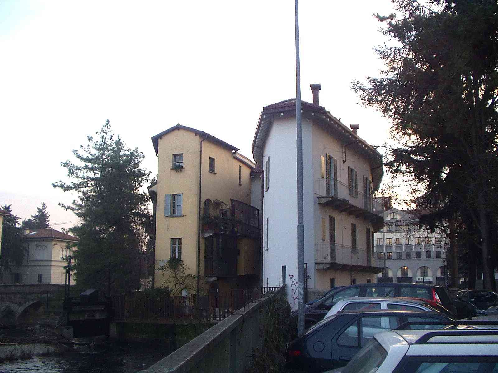 MB Monza Museo Mulino Colombo - i due corpi di fabbrica del mulino sullo sfondo di p.za Anita Garibaldi